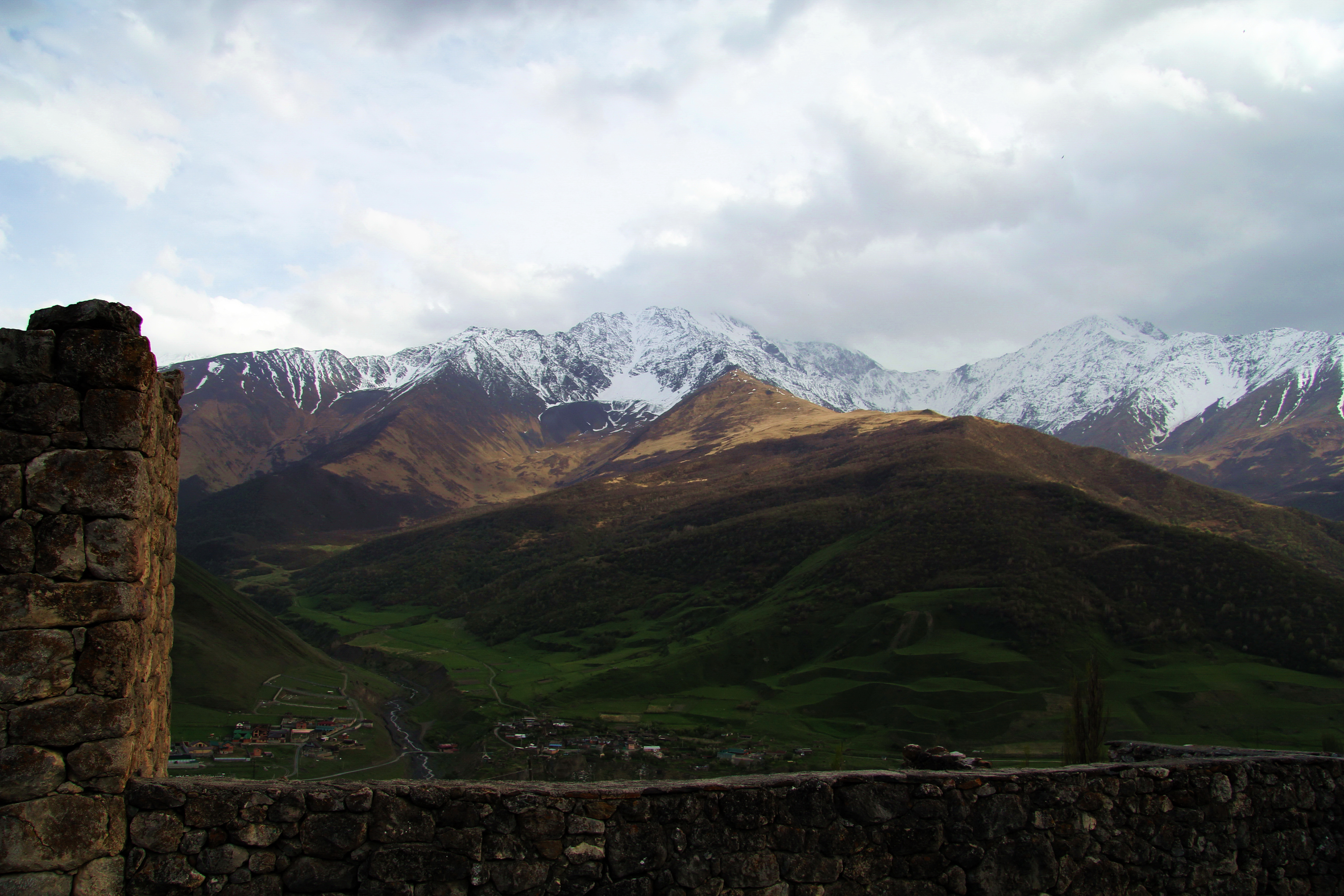 Фиагдонская стена, Алагирский район This image is related to the protected area of Russia number 1510133